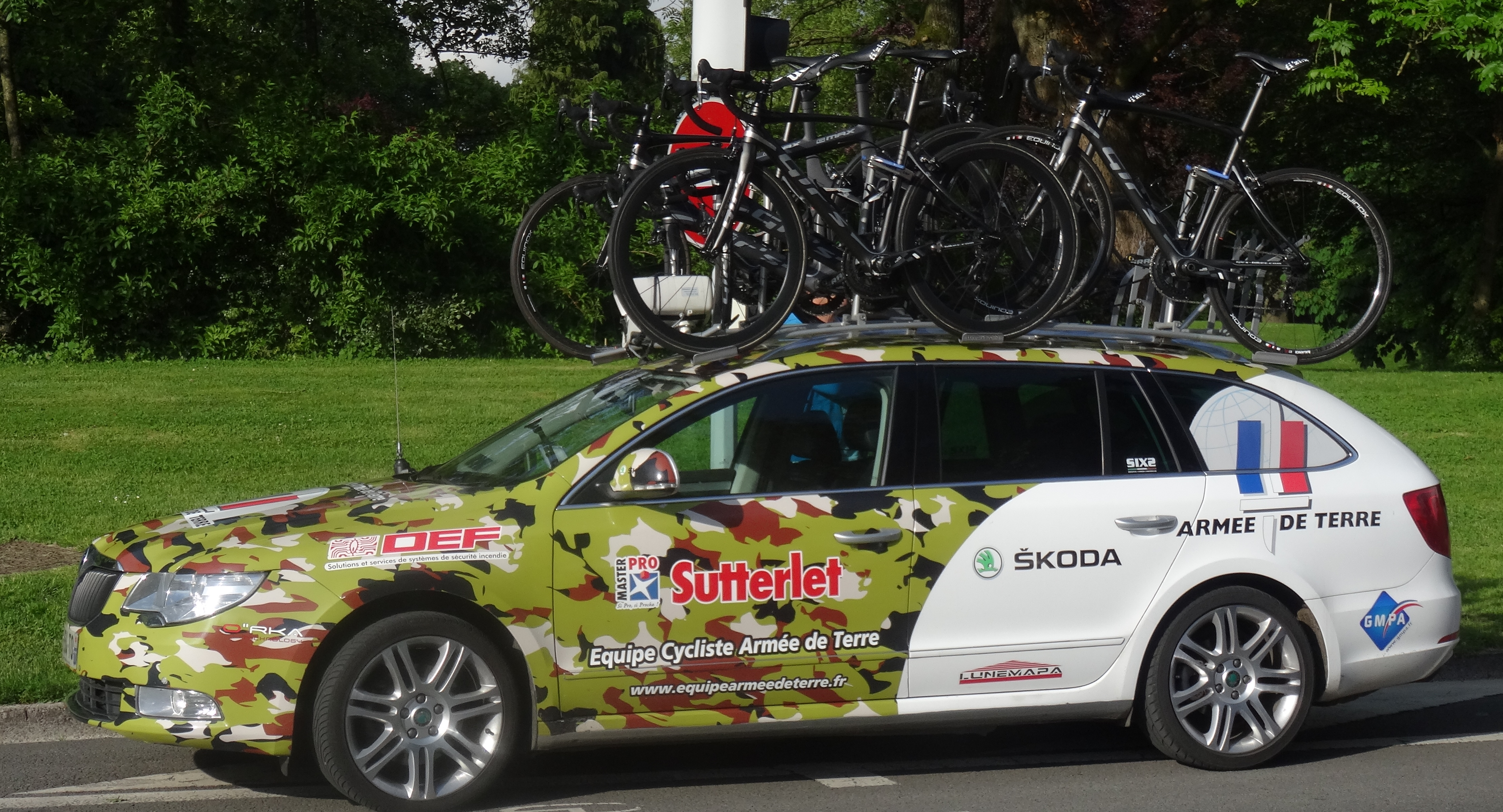 Reportage photographique réalisé le vendredi 23 mai 2014 à l'occasion de l'arrivée de la première étape du Paris-Arras Tour 2014 devant la citadelle d'Arras, Pas-de-Calais, Nord-Pas-de-Calais, France.